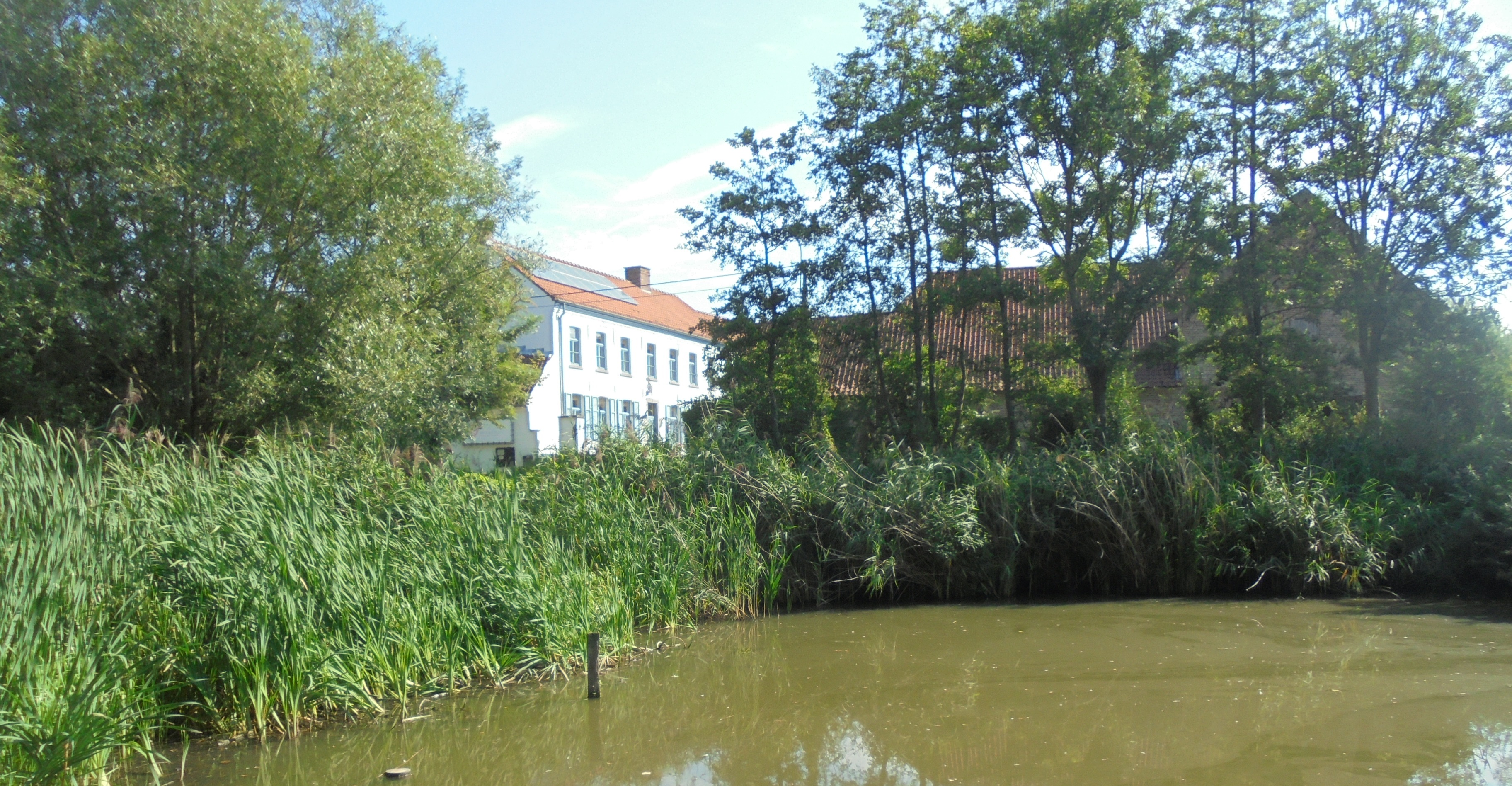 De Kaaihoeve, Provinciaal Natuureducatief Centrum - Oude Scheldestraat - Meilegem - Zwalm - Oost-Vlaanderen - België.Op de voorgrond een oude Schelde-arm.